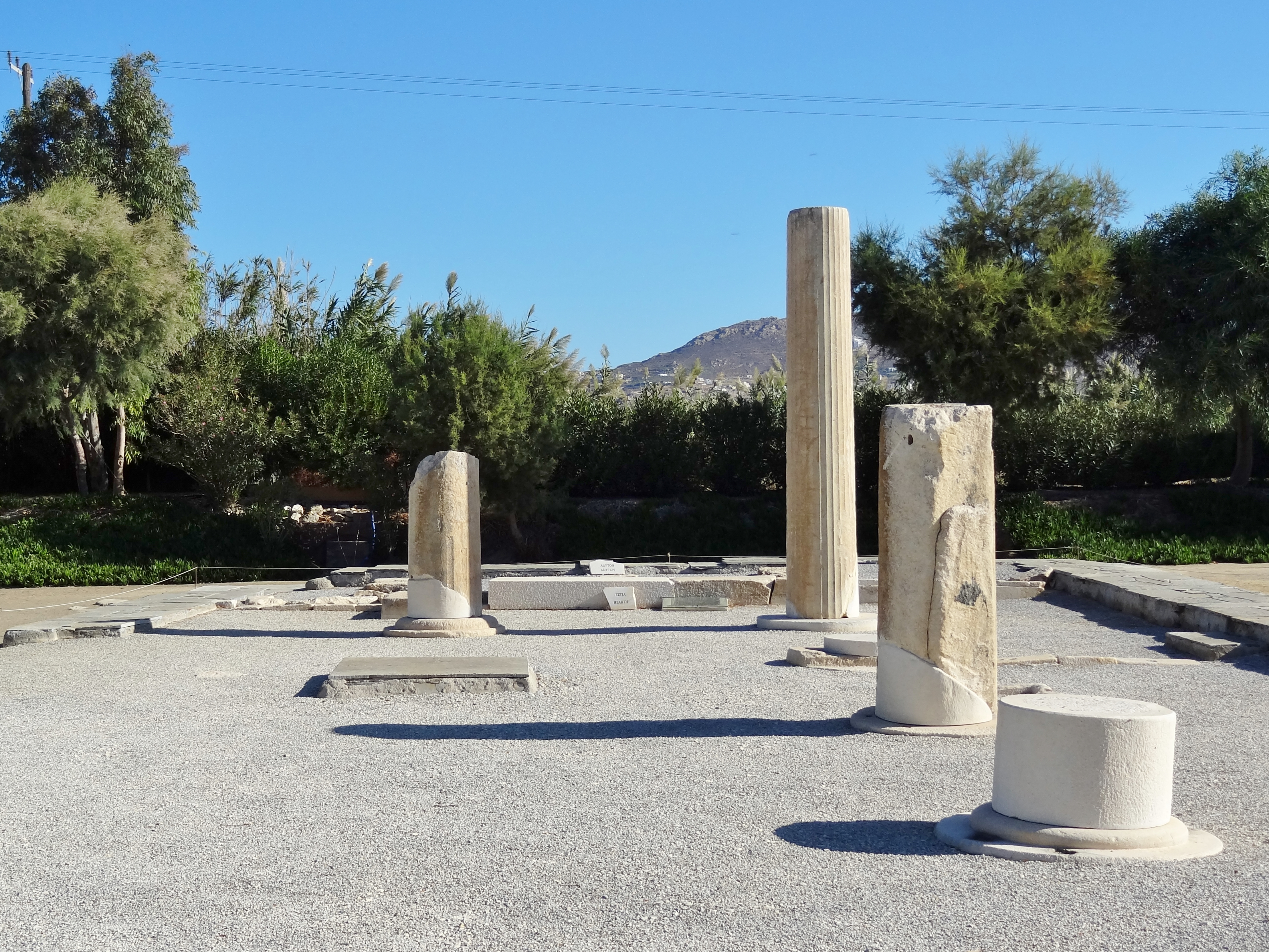 Tempel des Dionysos von Yria auf Naxos, Kykladen, Griechenland